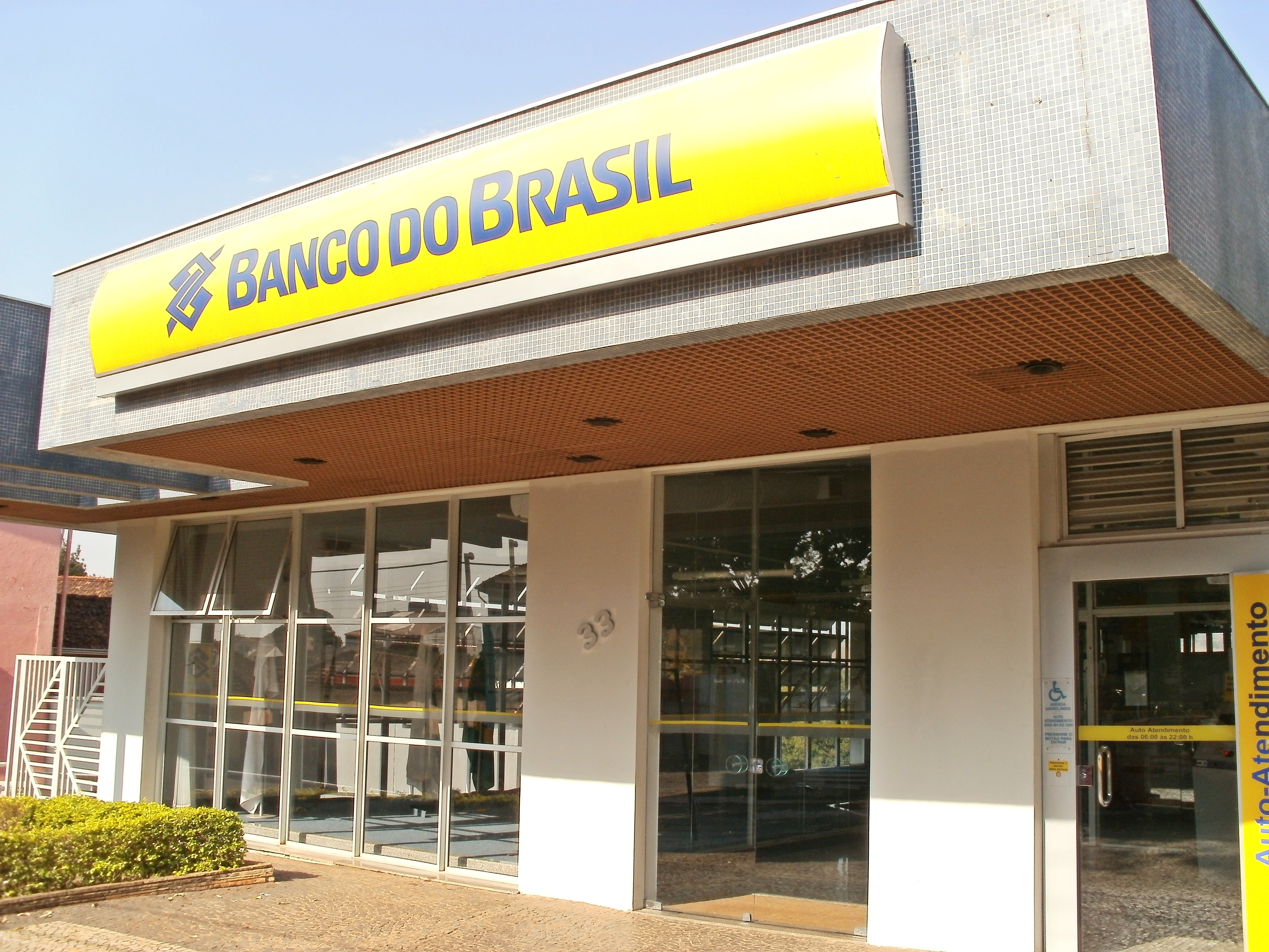 Vista do Banco do Brasil no Centro de Andrelândia-MG.